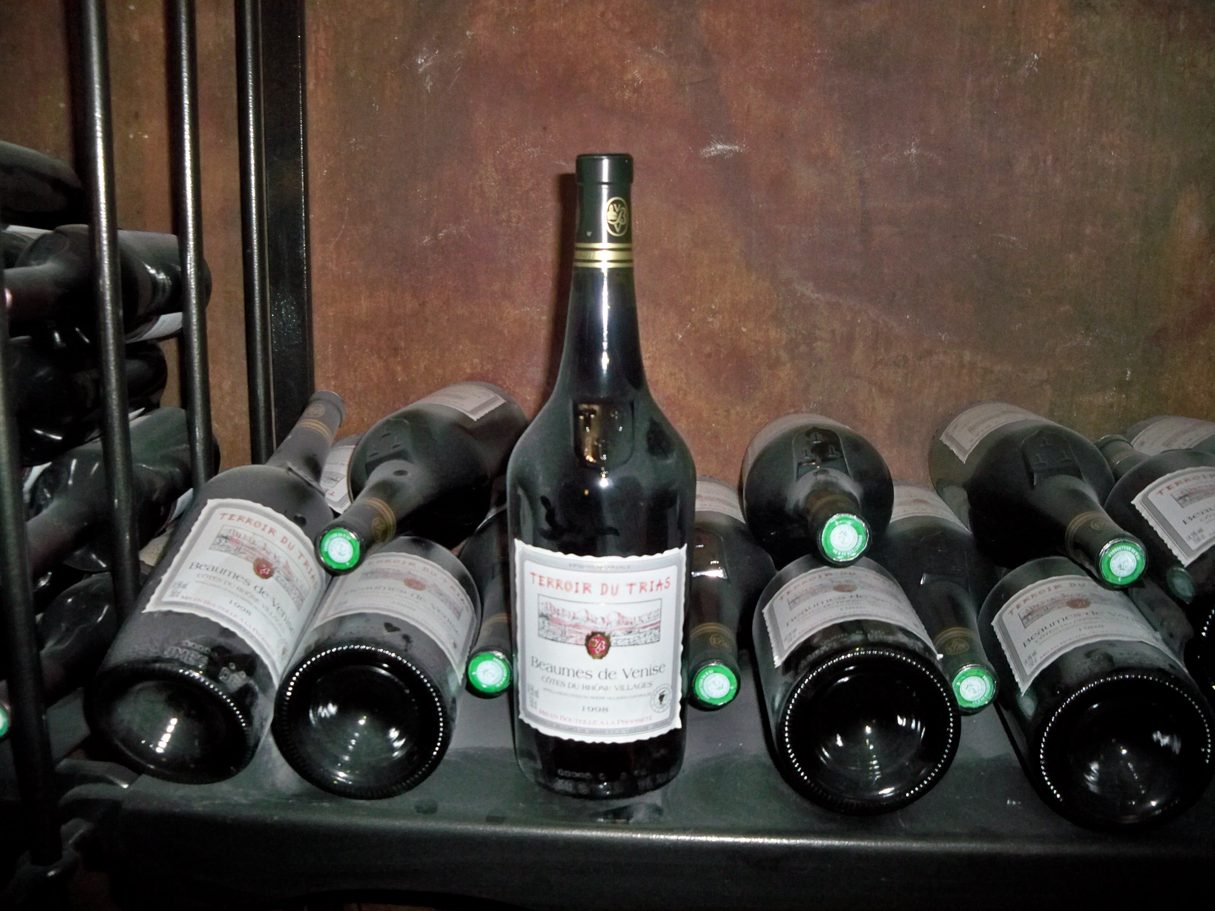 Bouteilles de Beaumes de Venise, Terre du Trias